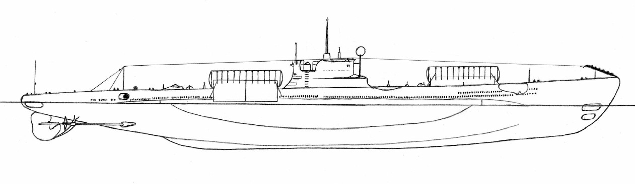 Итальянская подлодка "Шире" с контейнерами для торпед "Майале" на палубе